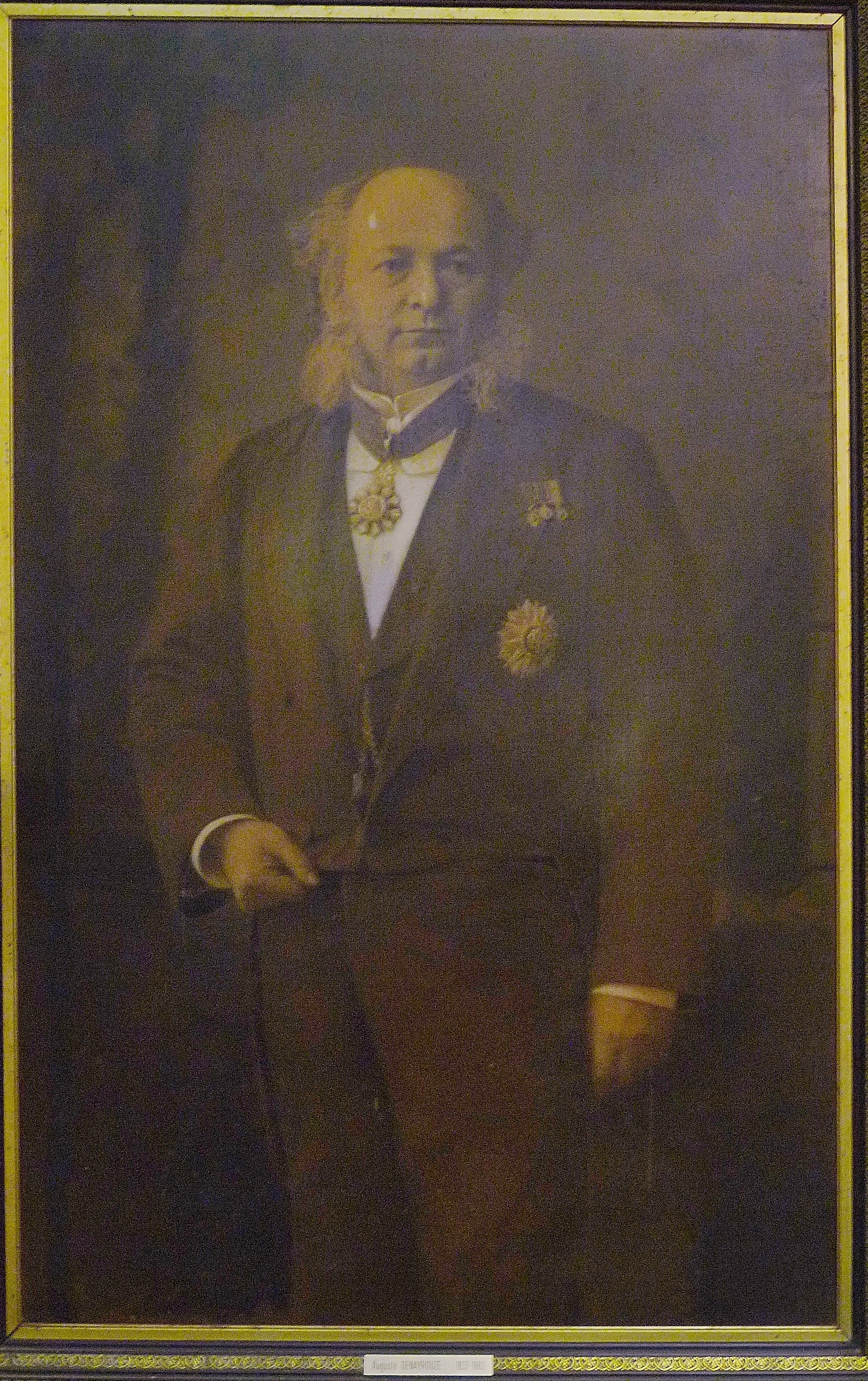 Portrait de Auguste Denayrouze (1837-1883), l'un des inventeurs du scaphandre autonome; artiste anonyme; Musée Joseph Vaylet, Espalion, France